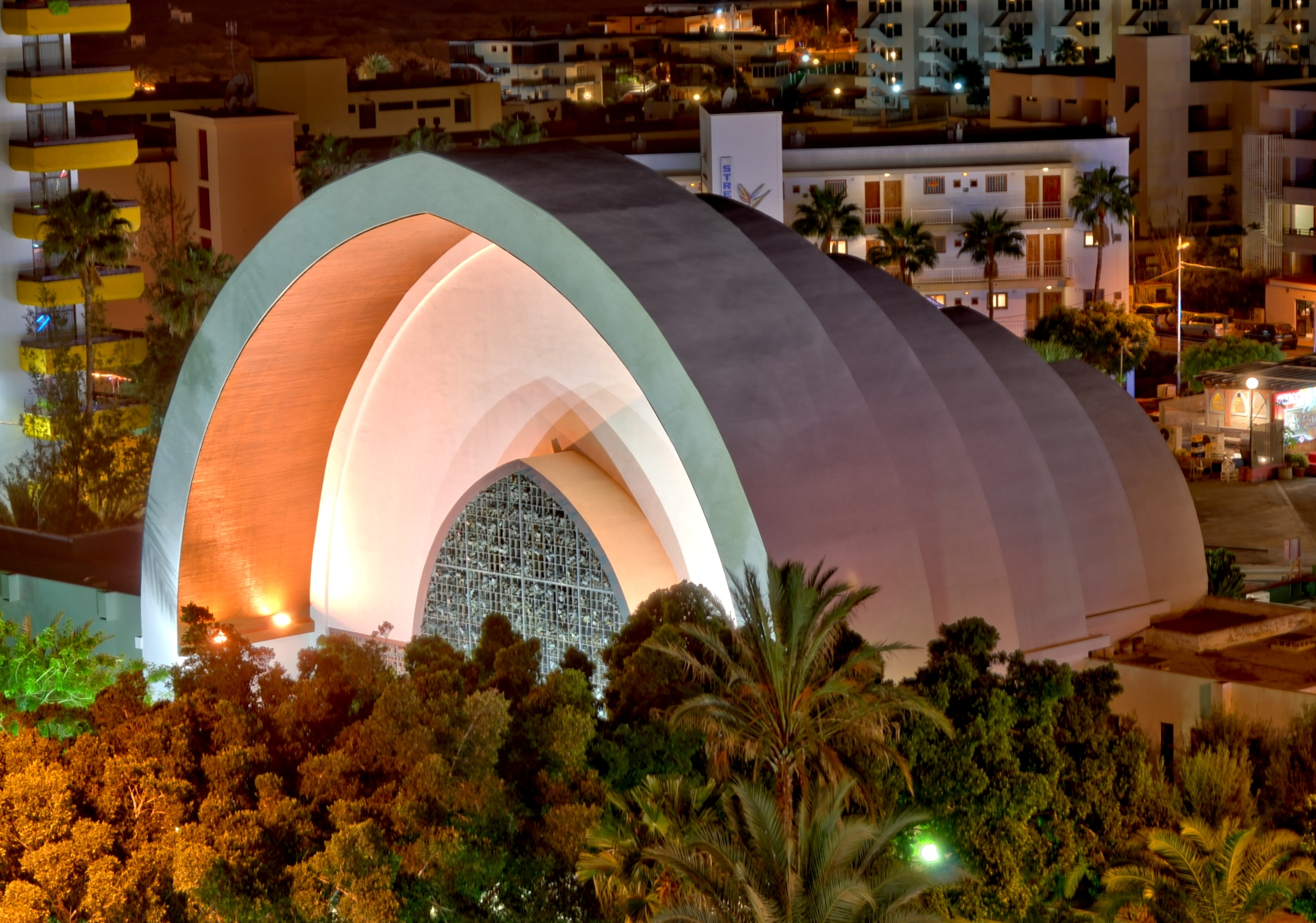 Der Templo Ecomenico bei Nacht